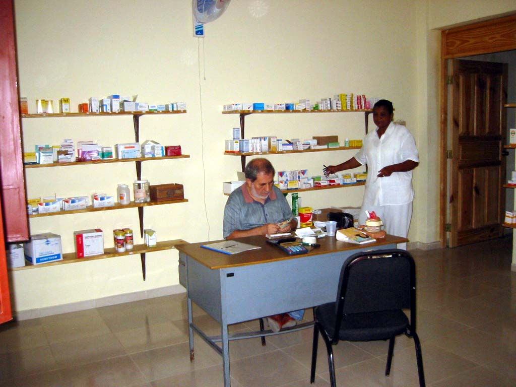 Missione genovese del Guaricano - Santo Domingo de Guzman (Dominican Republic), Ambulatorio del dispensario - Foto di Donpaolo